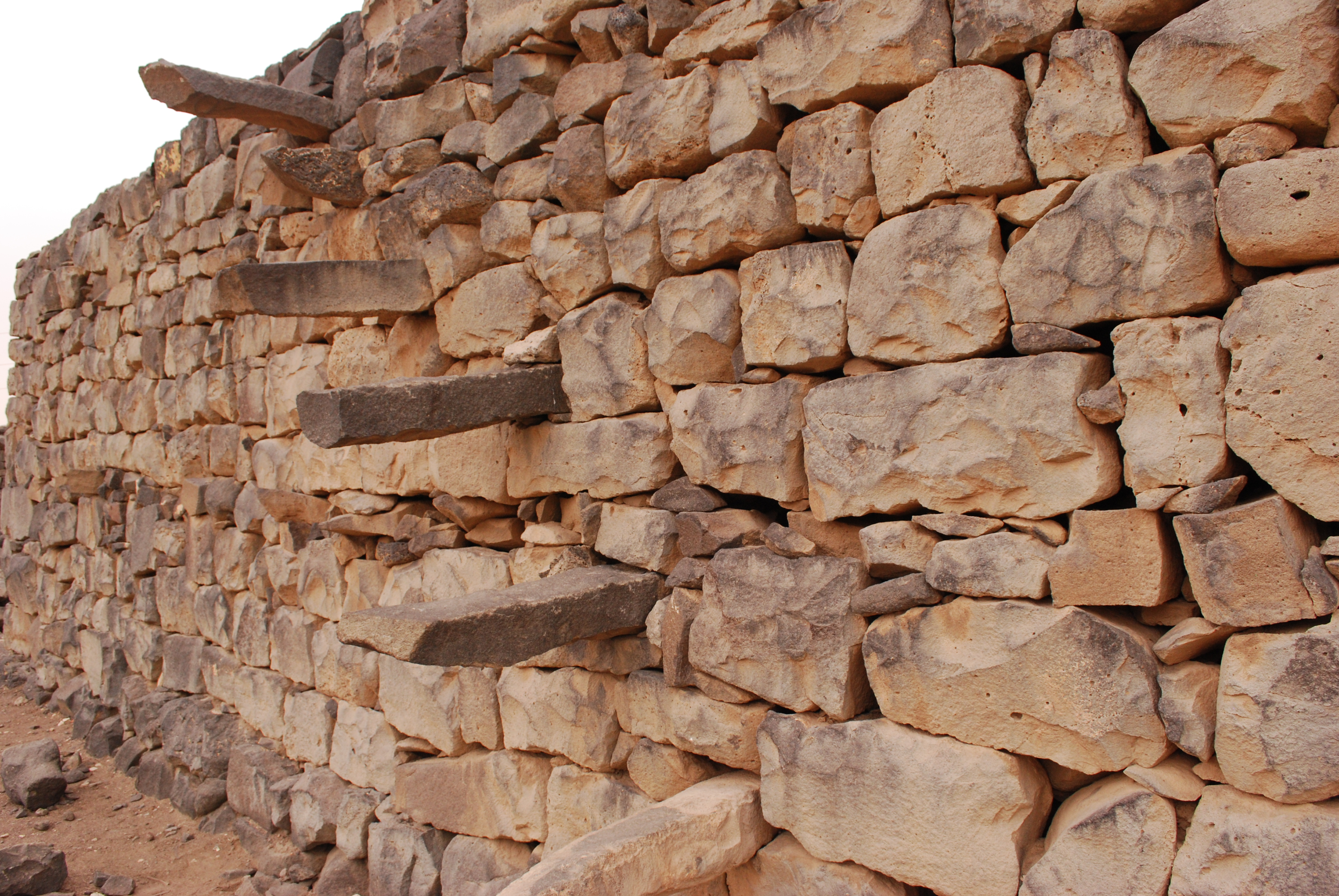 Qasr al Azrak : la mosquée, dans la cour intérieure.